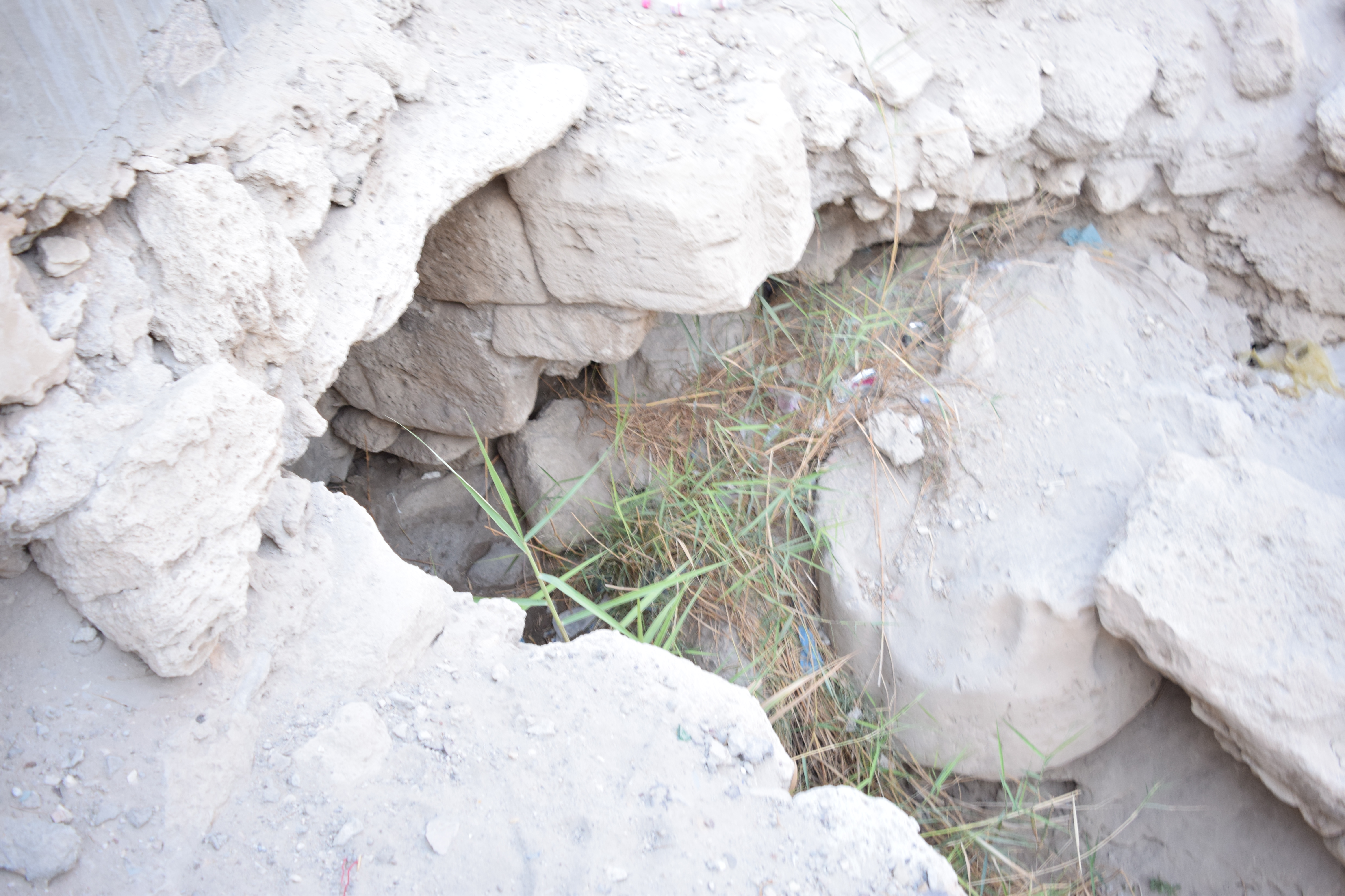 التفرق الذي يوصل الماء من عين العودة إلى حمام الباشا وحمام عين تاروت